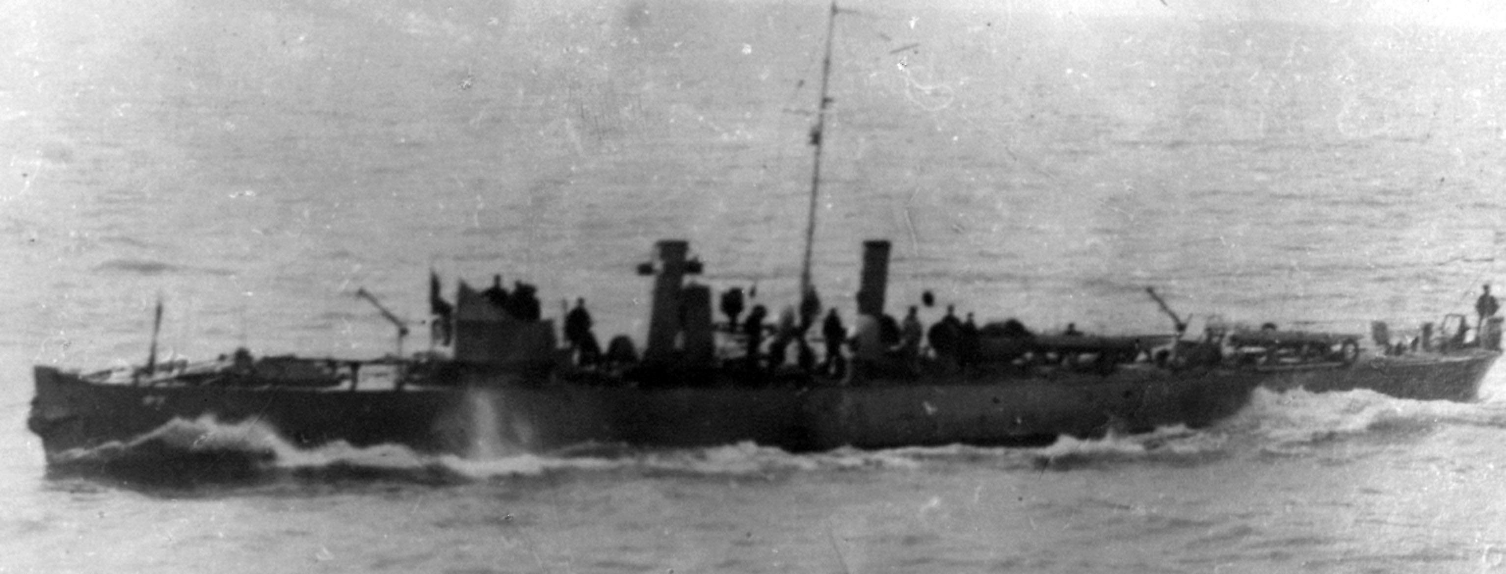 Torpedera de Mar de 1ra clase Comodoro Py en 1891.